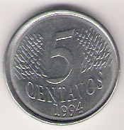 Frente da moeda de 5 centavos da primeira geração. Cunhada em 1994. This graphic was created with GIMP.